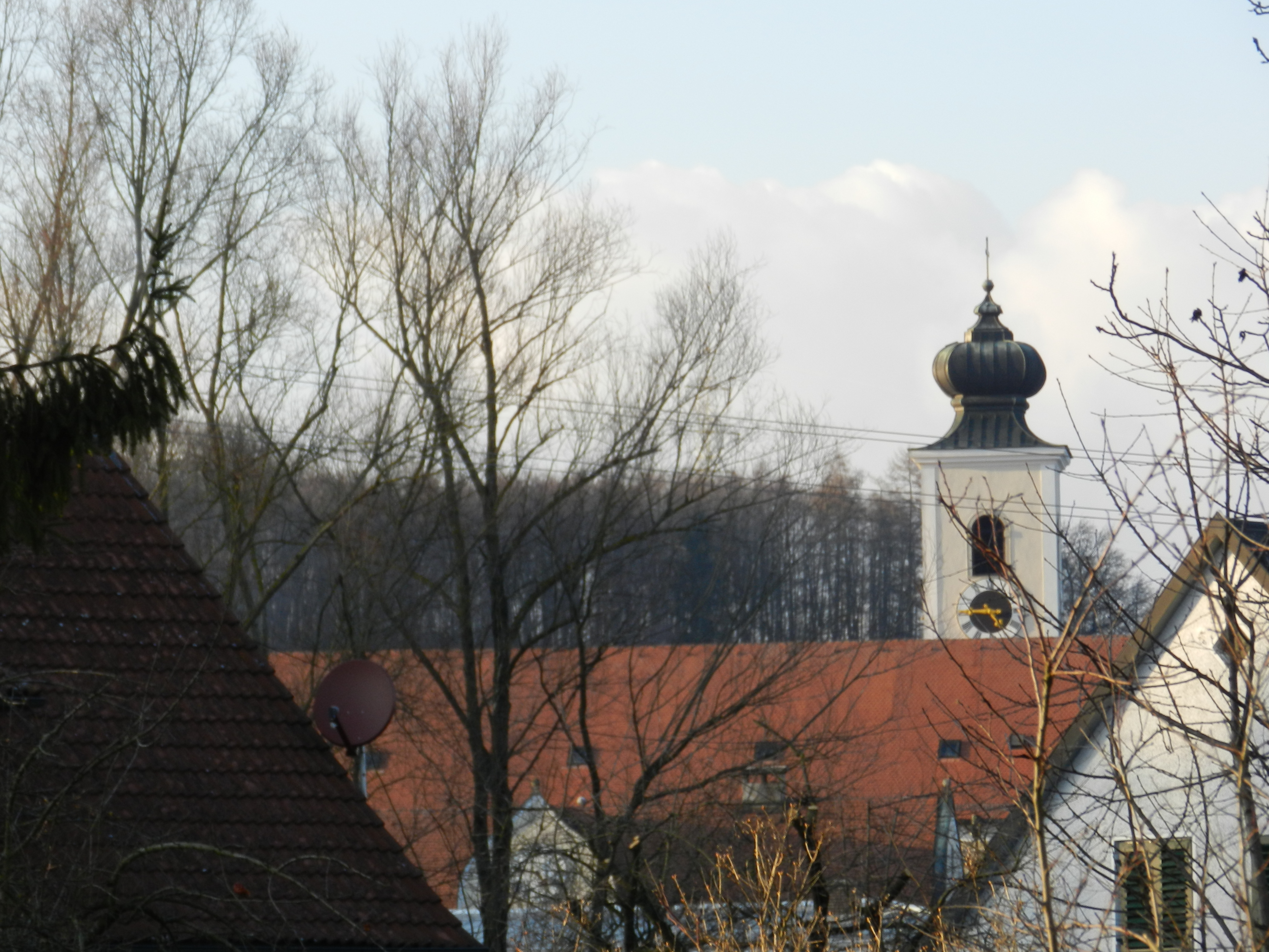 Südansicht des Benediktinerstifts Gleink.